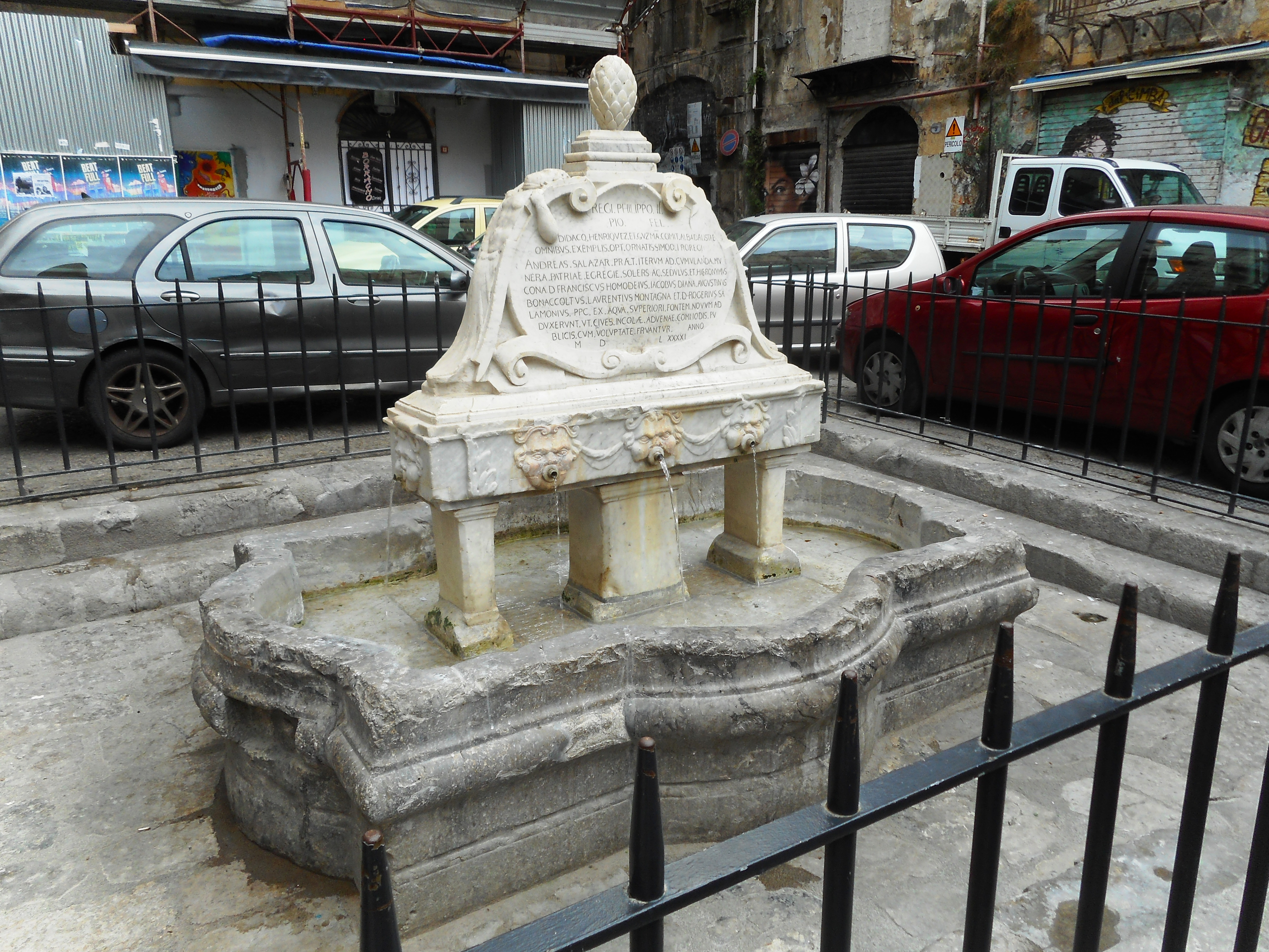 Fontana del Garraffello dopo il restauro